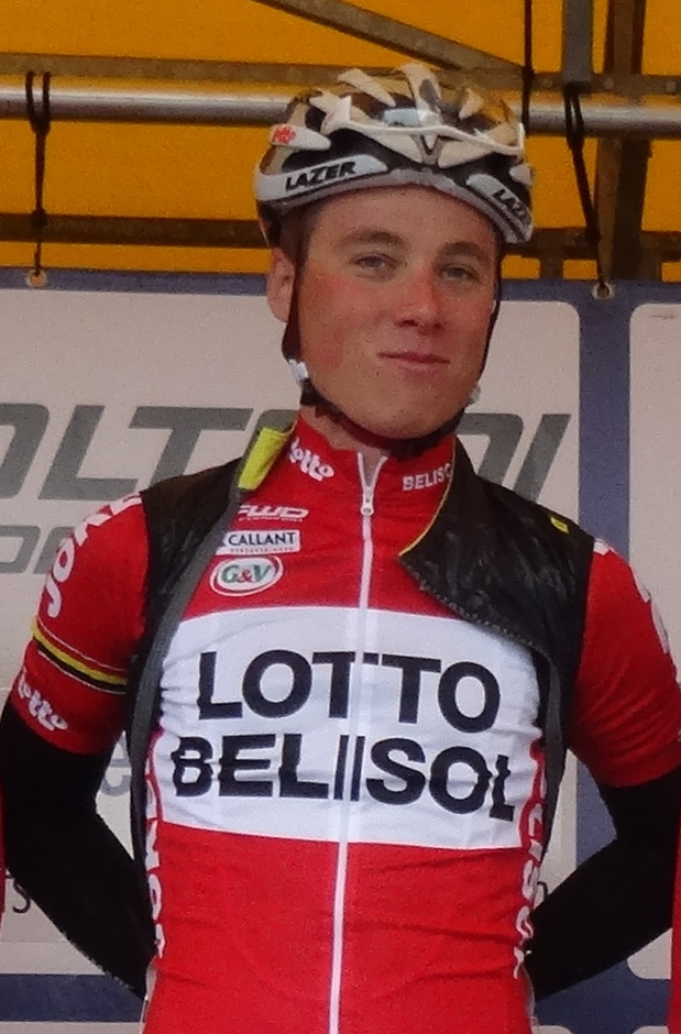 Reportage photographique réalisé le samedi 5 juillet à l'occasion du départ et de l'arrivée du Circuit Het Nieuwsblad espoirs 2014 à Grotenberge (Zottegem), Belgique.